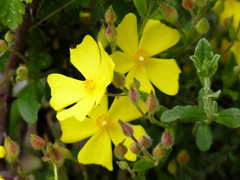 Halimium lasianthum subsp. alyssoides